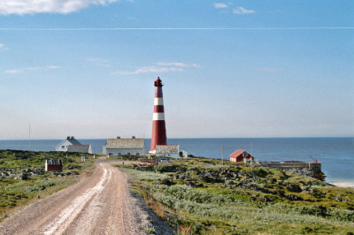 Slettnes fyr ist der nördlichste Leuchtturm am europäischen Festland, nach anderen Quellen sogar der ganzen Welt. (→Slettnes fyr)